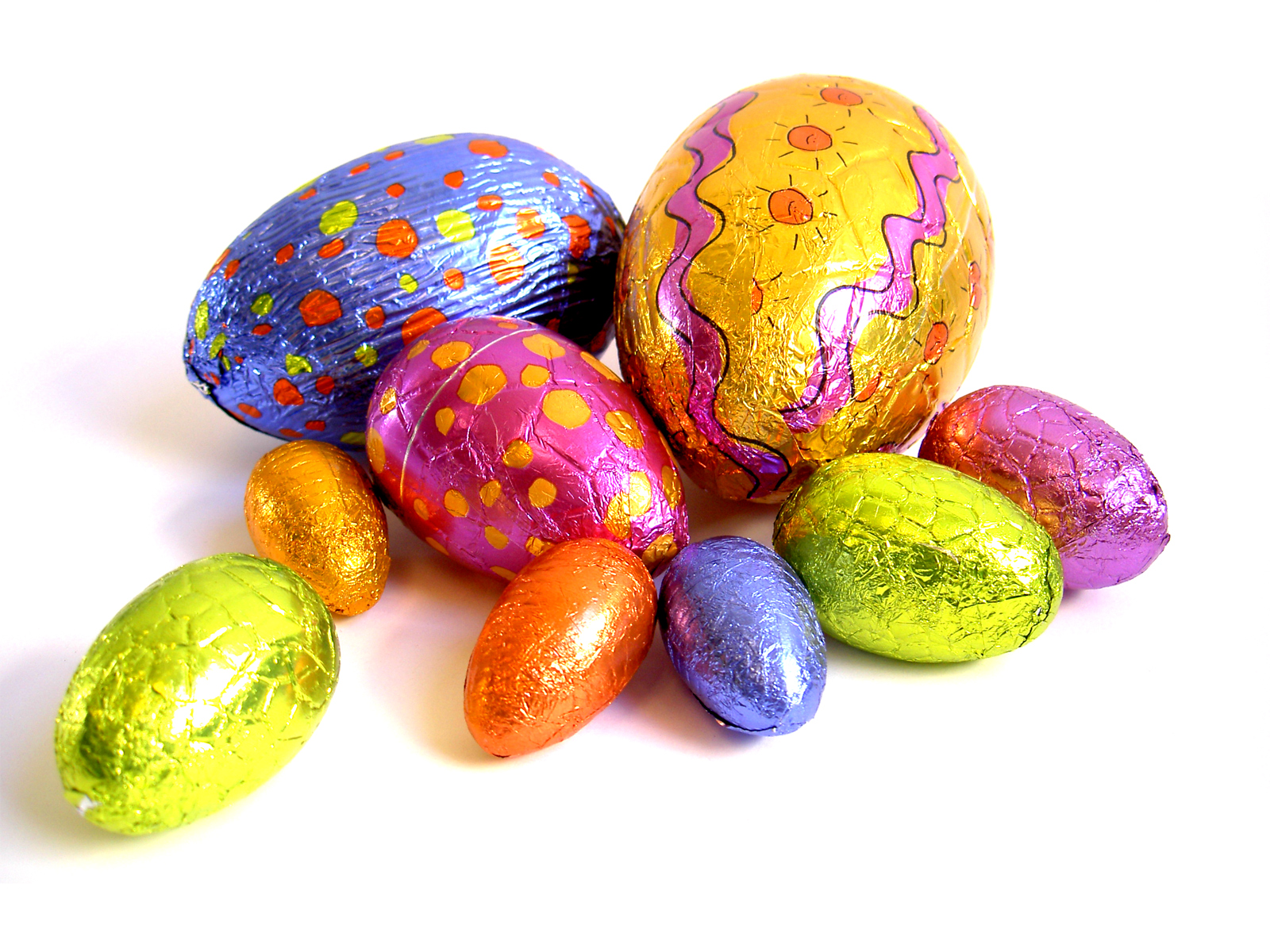 Easter eggs // Ostereier